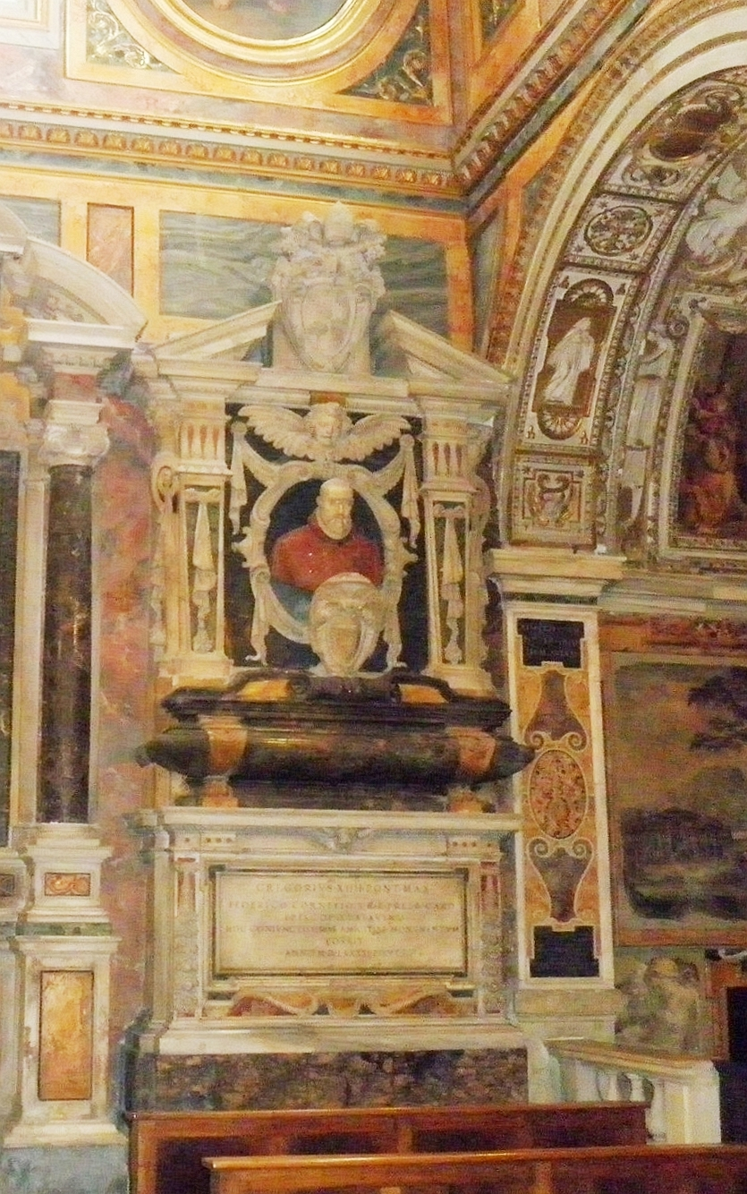 Roma, san Silvestro al Quirinale: Epitaffio del Cardinale Federico Cornaro